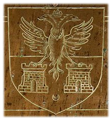 Lapide tombale in ottone di Teodoro [padre] a Landulph nella chiesa di St. Leonard e St. Dilpe. La lapide si trova nel coro e recita così: HERE LYETH THE BODY OF THEODORO PALEOLOGVS / OF PESARO IN ITALY DESCENDEN FROM YE IMPERIAL / LYNE OF YE LAST CHRISTIAN EMPORERS OF GREECE / BEING THE SONNE OF CAMILO YE SONNE OF PROSPER / THE SONNE OF THEODORO THE SONNE OF IOHN / Y SONNE OF THOMAS SECOND BROTHER TO COSTANTIN / PALEOLOGVS THE 8TH OF THAT NAME AND LAST OF / YE LYNE YT RAYGNED IN COSTANTINOPLE VNTILL SVB / DEWED BY THE TURKES WHO MARRIED WITH MARY / YE DAUGHTER OF WILLIAM BALLS OF HADLYE IN / SOUFFOLKE GENT. & HAD ISSVE 5 CHILDREN THEO / DORO IOHN FERDINANDO MARIA & DOROTHY & DEPARTED THIS LIFE AT CLYTON YE 21YH OF IANVARY 1636. (Qui giace il corpo di Teodoro Paleologi [padre] di Pesaro in Italia; discendente dalla linea imperiale degli ultimi imperatori cristiani della Grecia. È il figlio di Camillo, figlio di Prosper, figlio di Teodoro, figlio di Giovanni, figlio di Tommaso secondo fratello di Costantino Paleologi 8° di questo nome e l'ultimo che ha regnato a Costantinopoli fino alla conquista da parte dei turchi; ha sposato Mary, figlia di William Balls di Hadley in Souffolke Gent e aveva 5 figli: Teodoro [seppellito in Westminster Abbey], Giovanni, Ferdinando [seppelito alle Barbados] Maria e Dorothea e finisce questa vita a Clyton il 21 gennaio [sic!] 1636.)